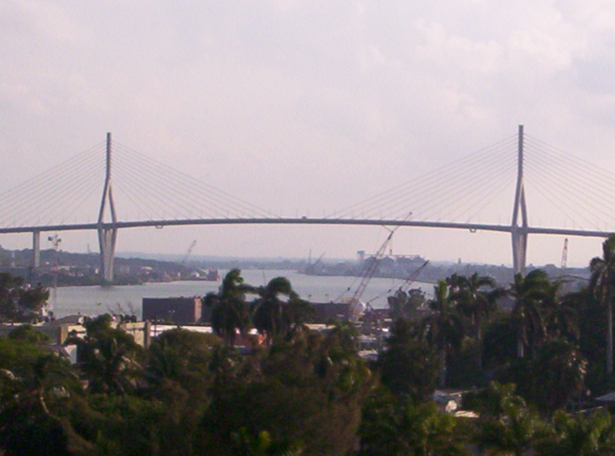 El puente Tampico Vista Lejana